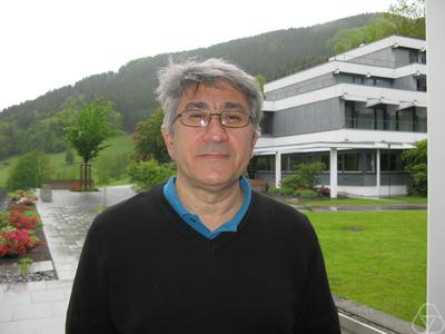 Foto di Halil Mete Soner